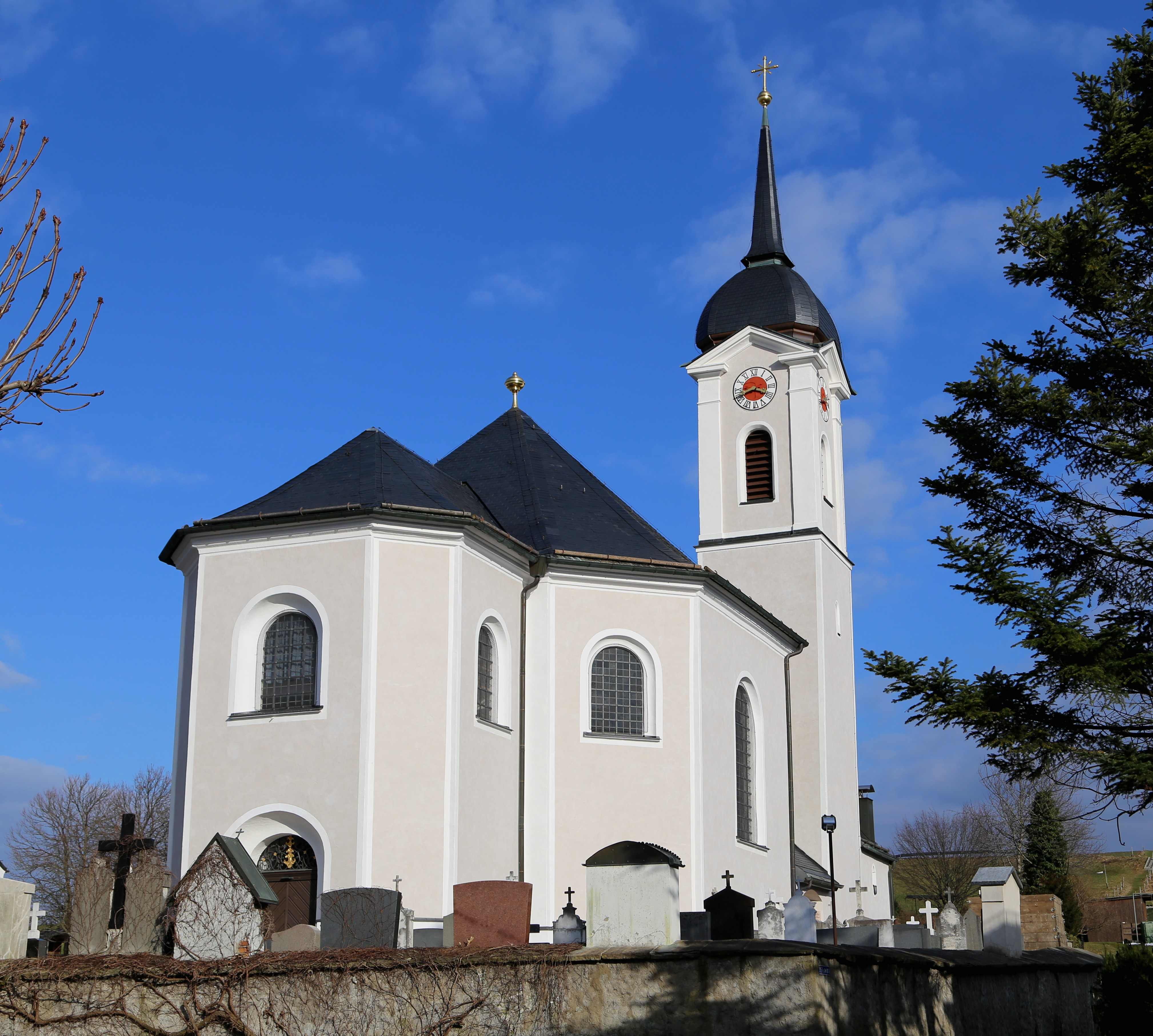 Endorfer Straße 16, Söllhuben; Kath. Pfarrkirche St. Rupert und Martin, zentralisierender Saalbau mit doppelstöckiger Sakristei und Südturm mit Haubendach, spätbarock, 1766-69 nach Plänen von Johann Michael Fischer unter Verwendung des spätgotischen Vorgängerturms und eines Sakristeibaus von 1673 durch Georg Steindlmüller d.Ä. Errichtet, 1955-56 Aufstockung der Sakristei; mit Ausstattung.